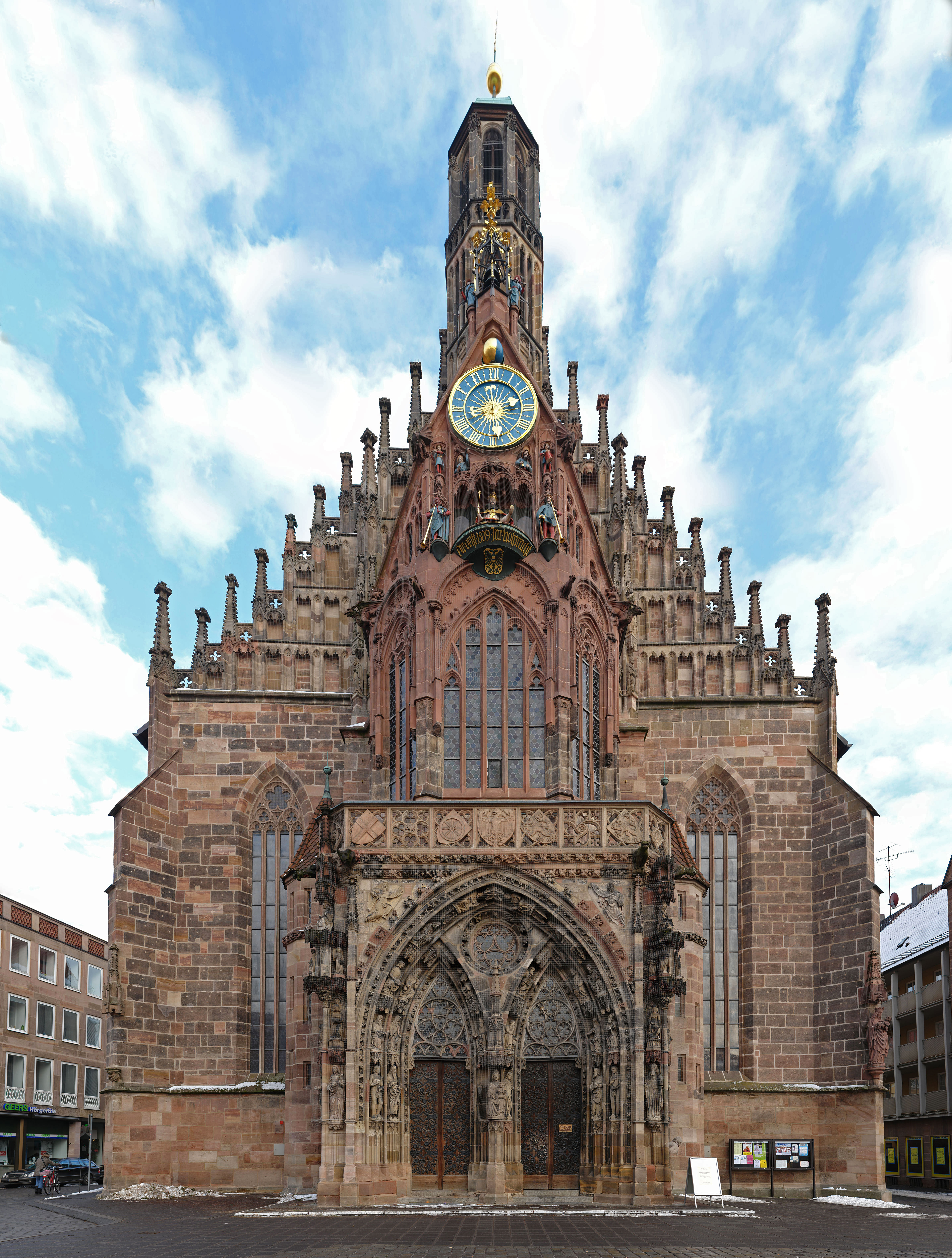 Frauenkirche Nürnberg